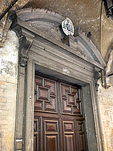 La porta maggiore della chiesa di San Francesco Grande a Padova